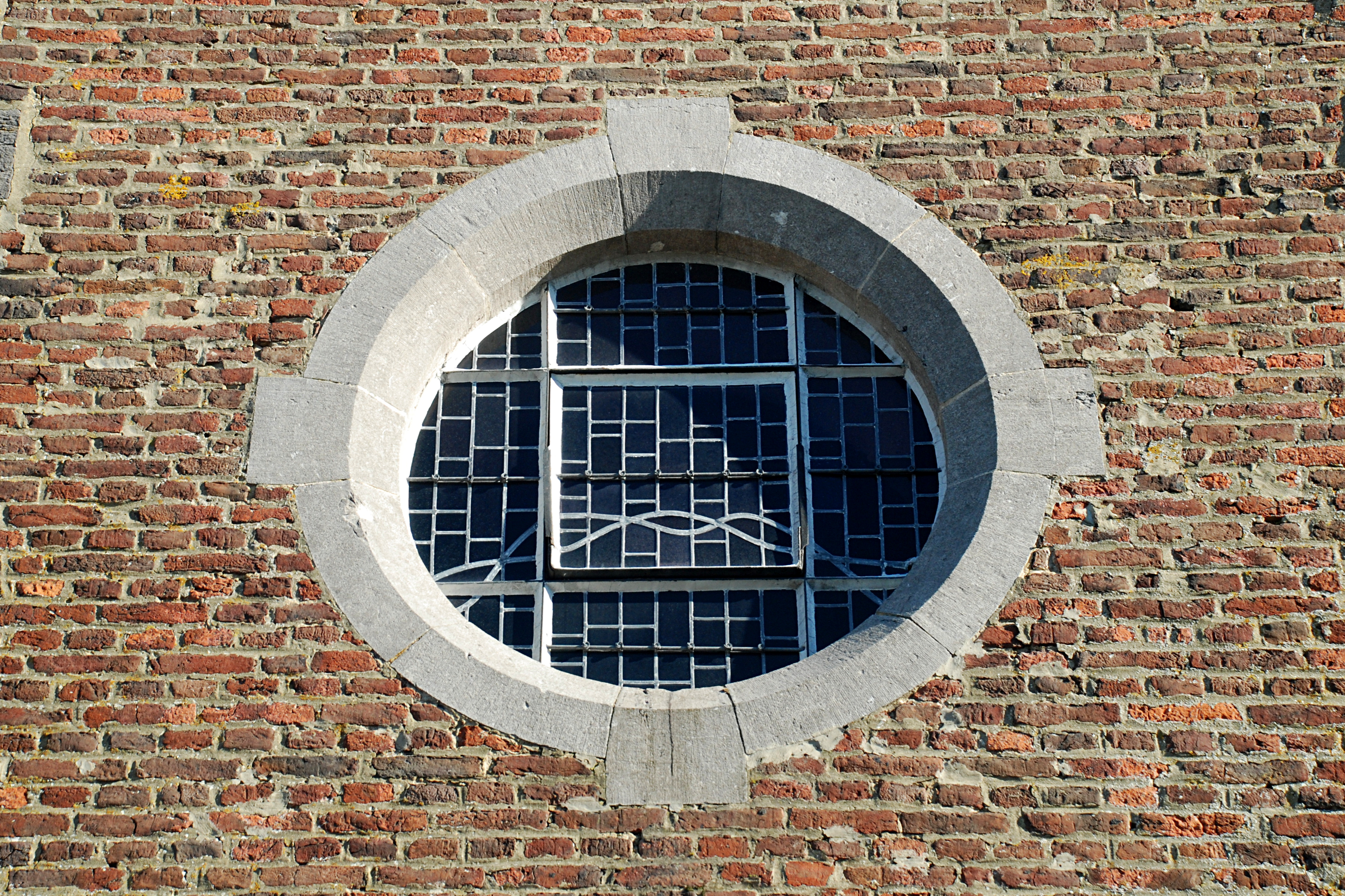 Belgique - Brabant wallon - Chastre - Cortil-Noirmont - Église Saint-Pierre de Noirmont